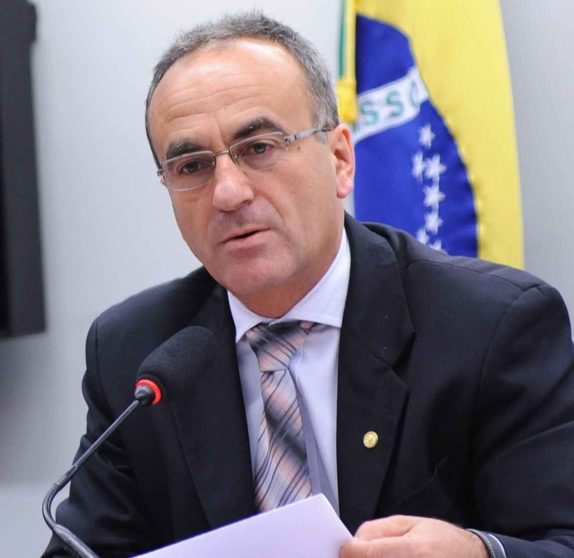 Marcon em setembro de 2015.